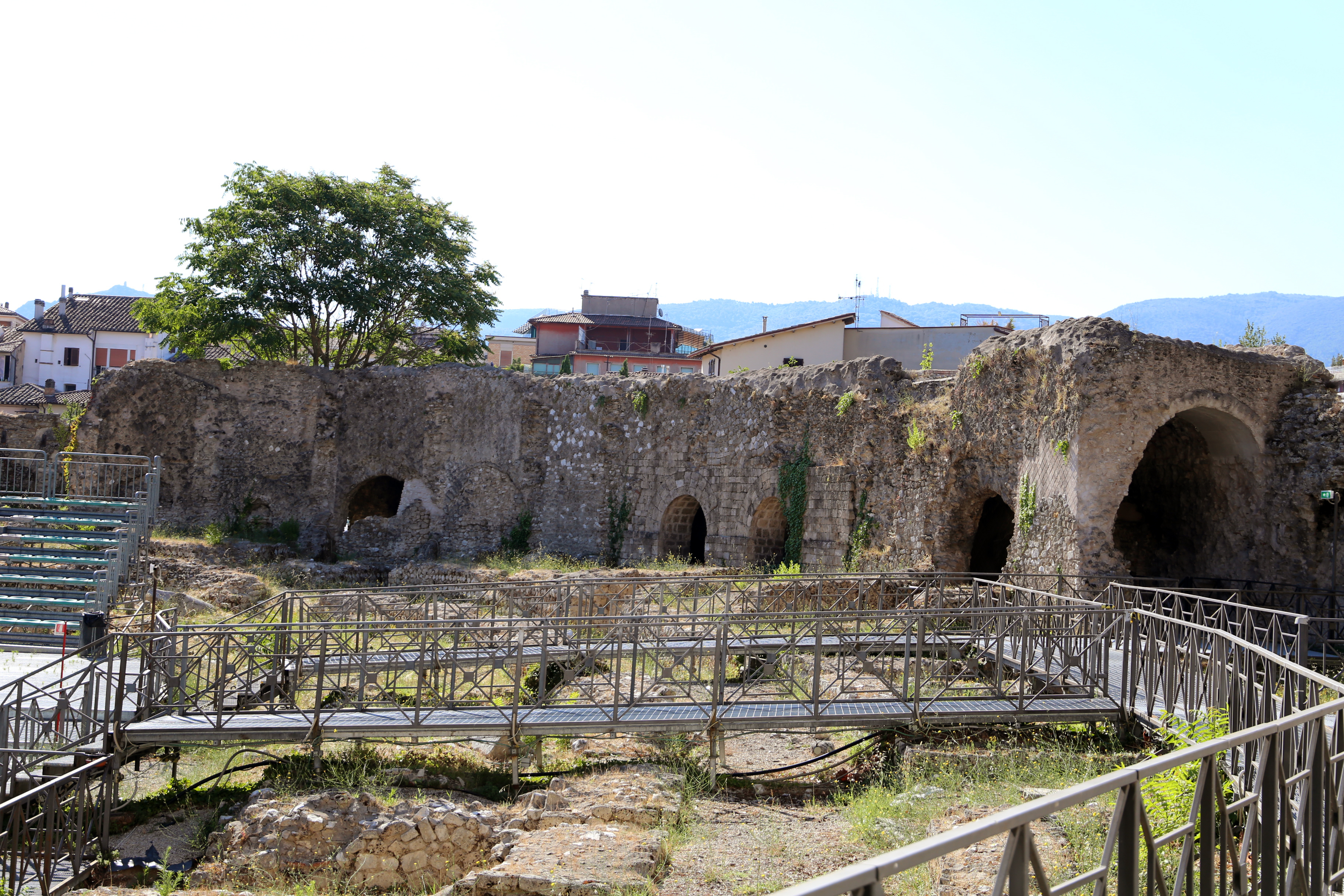 Anfiteatro Fausto This is a photo of a monument which is part of cultural heritage of Italy.